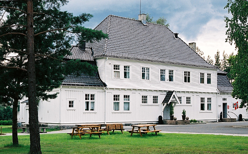 Sorenskrivergården, Hokksund. I dag museum for Nøstetangen glassbruk. Arkitekt Karl Güettler, 1904